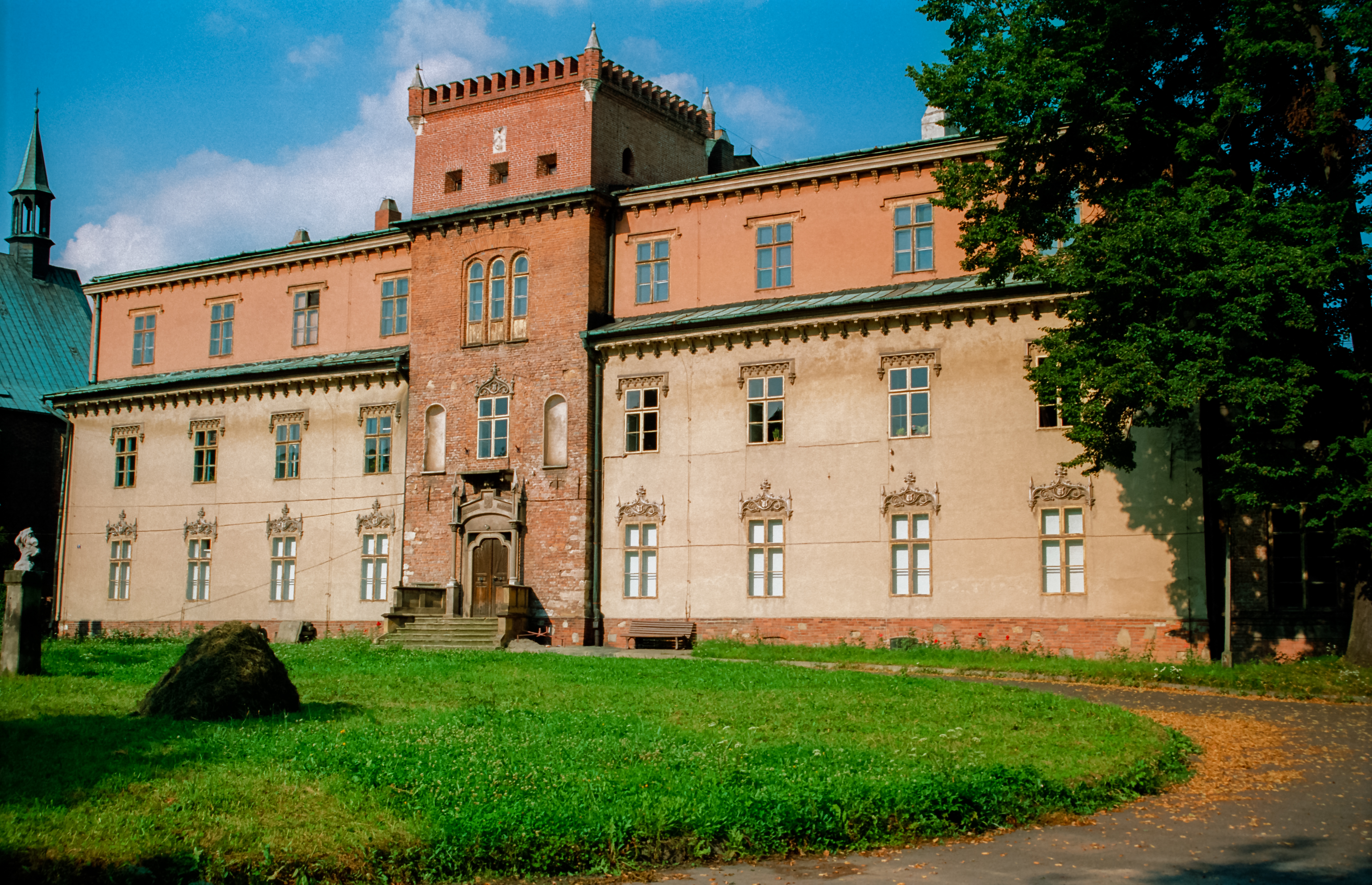 Zator, przebudowany zamek